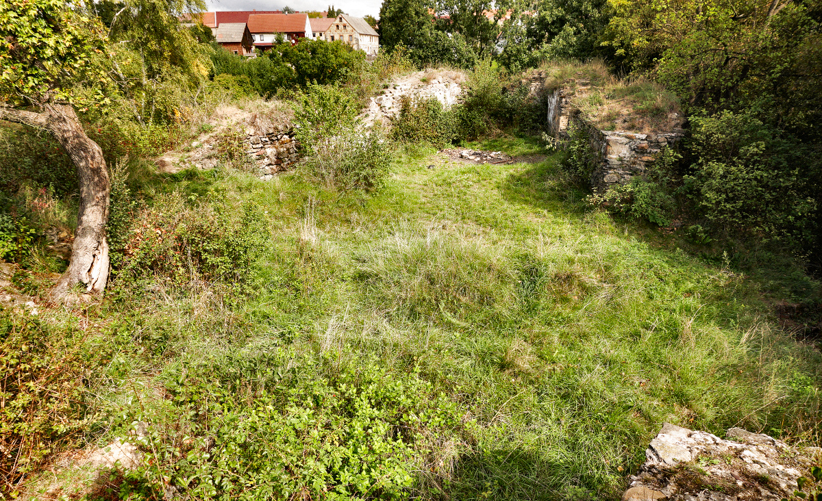 Zřícenina hradu Hřídelík